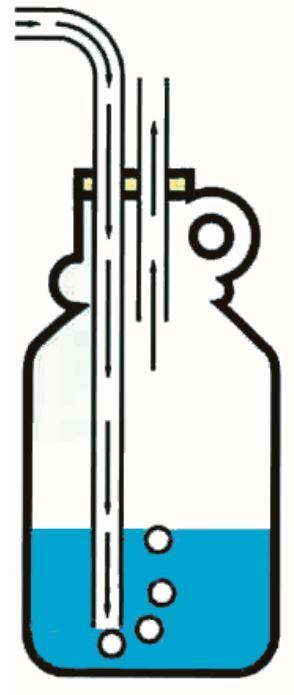 Wasserschloss